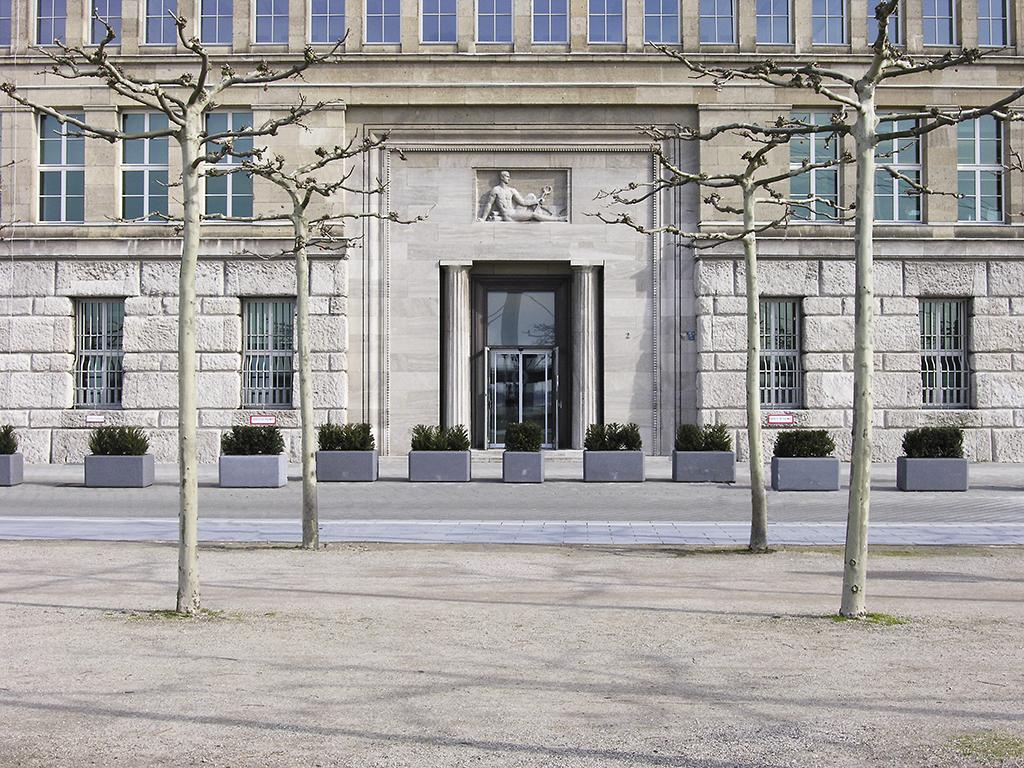 Hauptverwaltung Vodafone, ehemals Mannesmann, Haupteingang Url